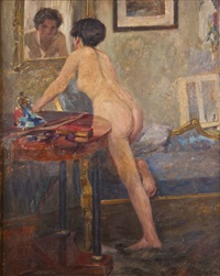 Carl Horn Interieur mit weiblichem Rückenakt vor Spiegel